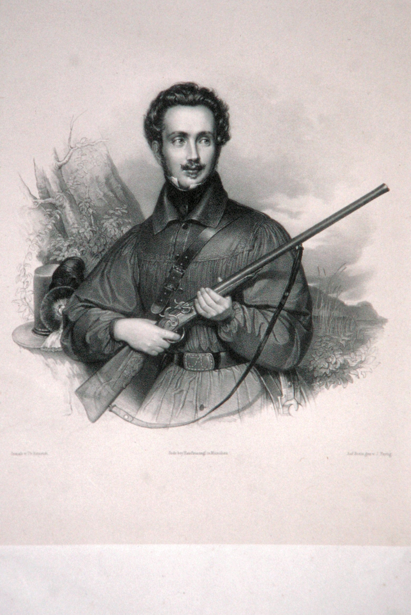 Auguste de Beauharnais, Lithographie von Ignaz Fertig, um 1850.